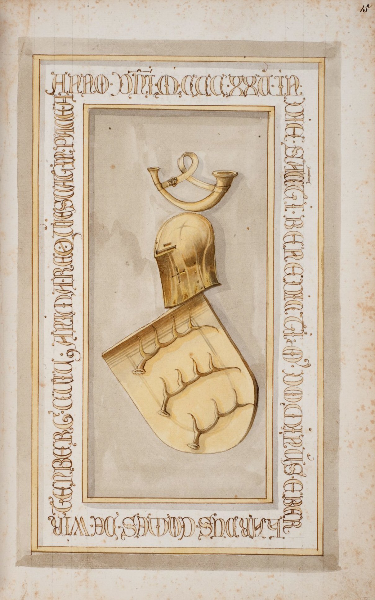 Memoriae posteritatique inclytae domus Wirtembergicae sacrum, 1583. (Nachbildungen alter Grabsteine des Württembergischen Fürstenhauses). Stuttgart, Württembergische Landesbibliothek, Cod.hist.fol.130 Graf Eberhard I. († 1325), Beschreibung nach File:Steiner Memoriae domus Wirtembergicae 048.jpg: Eberhardi Comes Würtembergensis dictus ILLVSTRIS Ulrici et Agnetis Poloniae Ducissae .F. Obijt. Die Sancti Benedicti (verbessert Bonifacij. id est 5. Junij.) Anno .M.CCC.XXV.